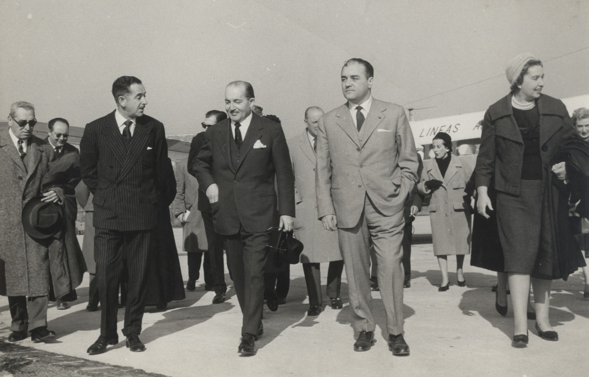 Título original: Visita de ministros dentro de los actos conmemorativos del Tricentenario de la Paz de los Pirineos y II Reunión Hispano-francesa de estudiantes universitarios : llegada al aeropuerto